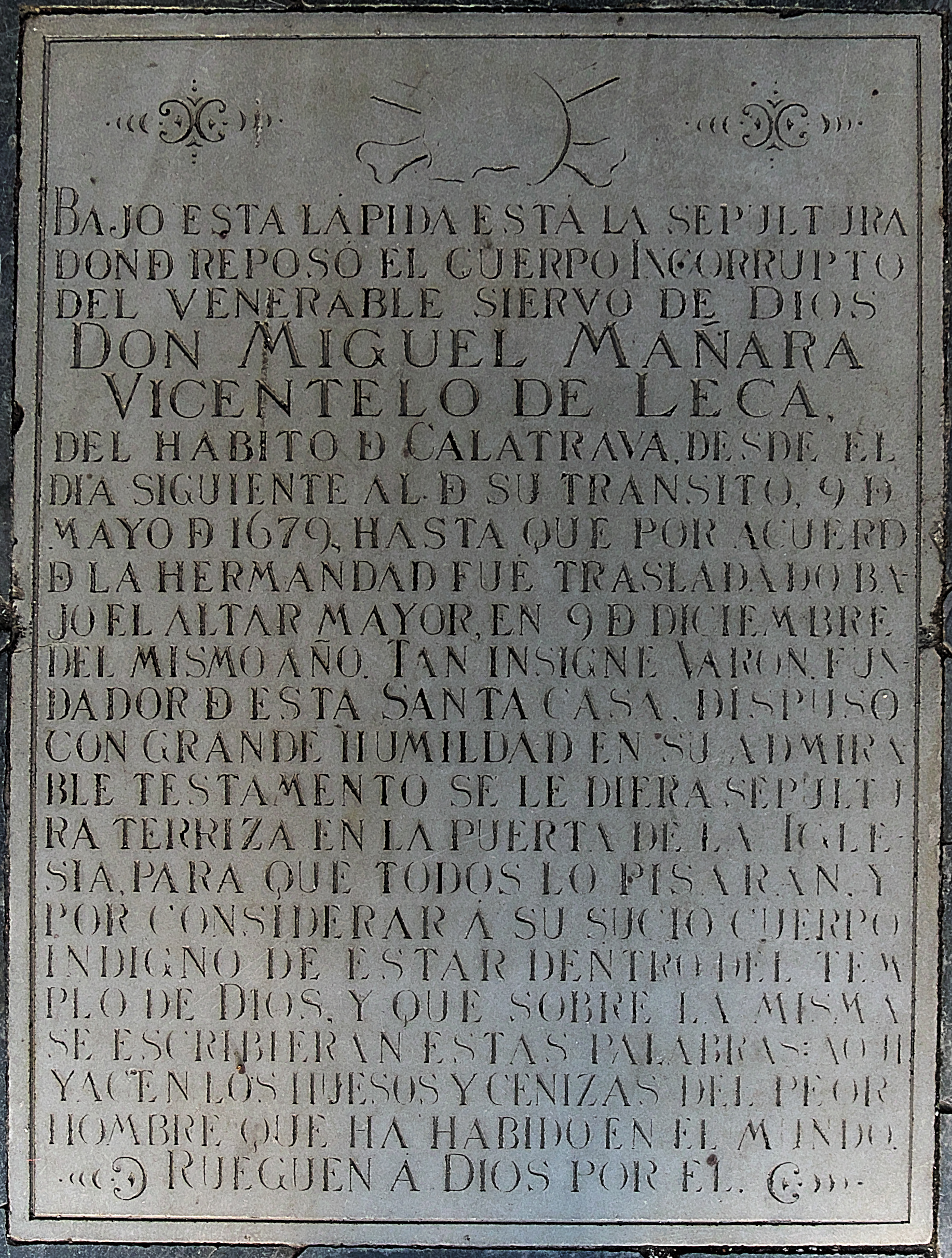 Iglesia del Señor San Jorge (Sevilla). Losa sepulcral situada a la entrada al templo para ser pisada por los fieles, según deseo de don Miguel.